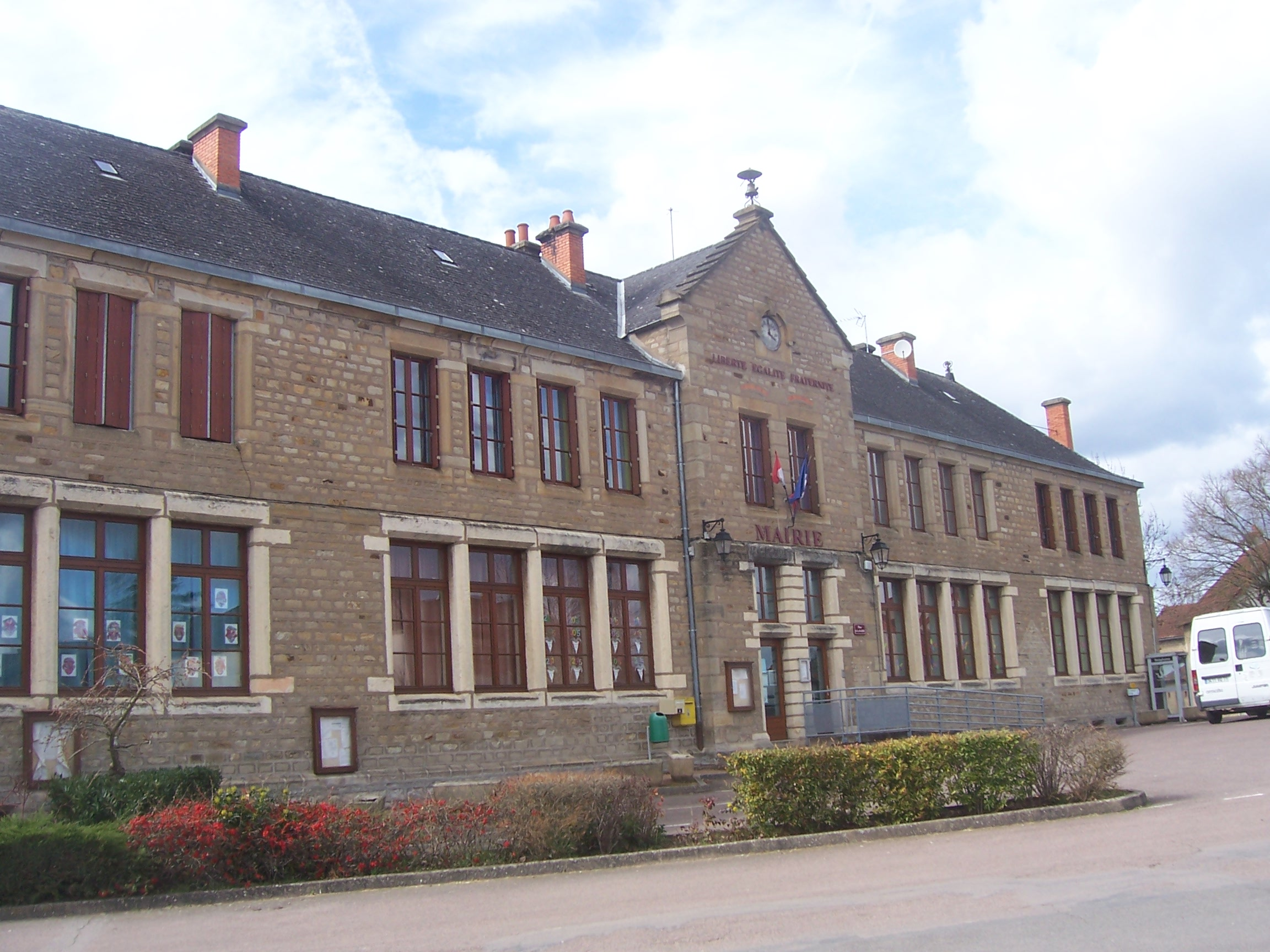 Mairie de Dracy-Saint-Loup